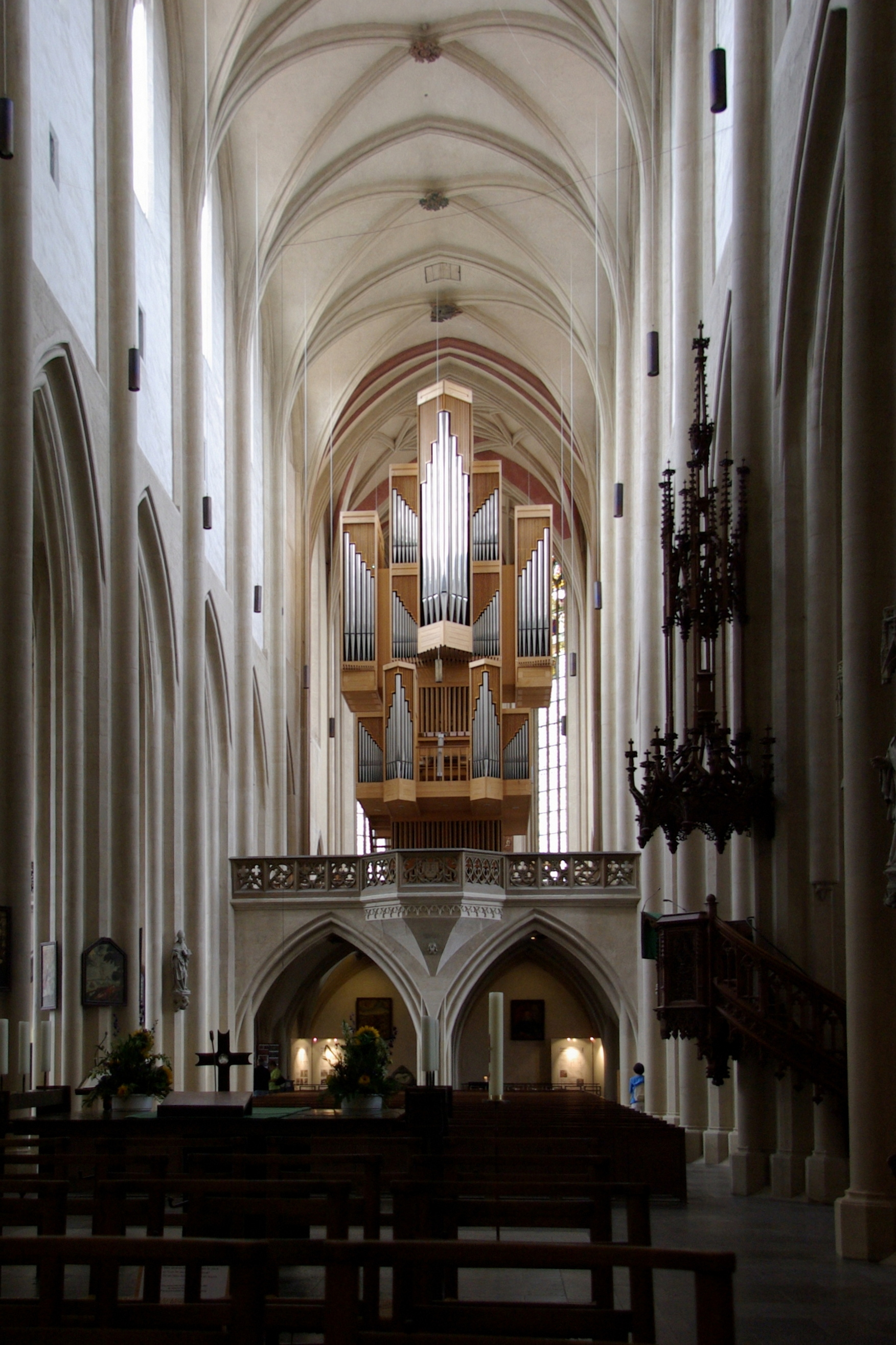 Rothenburg ob der Tauber, St. Jakobs Kirche, Mittelschiff mit Orgel